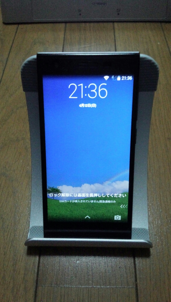 携帯端末のロック画面